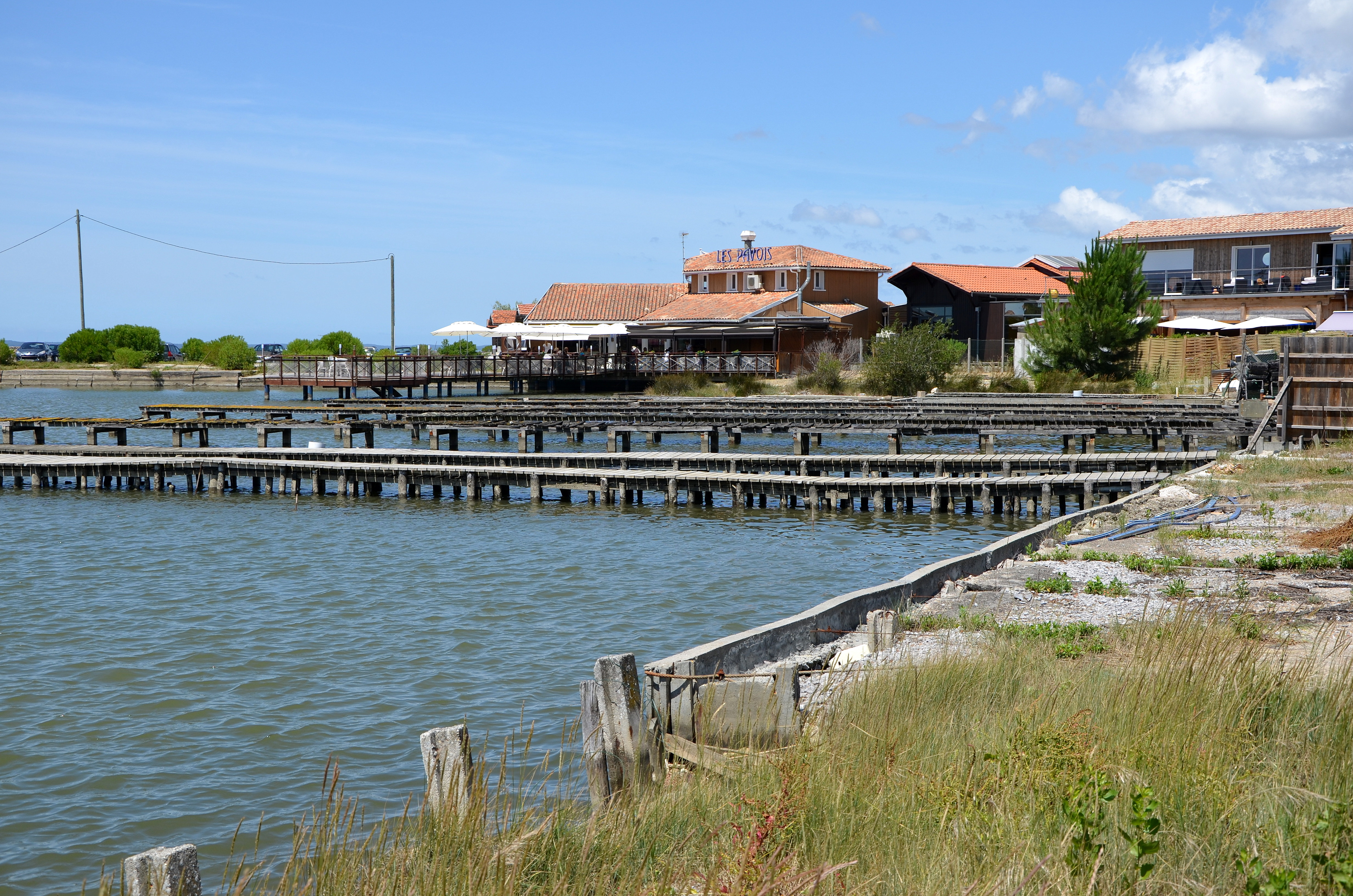 Parc à huitres à Port ostréicole à Gujan-Mestras, Gironde, France